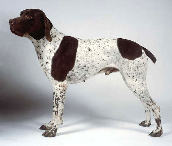 jedna z ras psów należąca do grupy wyżłów kontynentalnych, w podsekcji psów w typie gończym